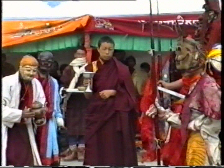 Jakhar City, Tamshing-Lhakang monastery, Bhutan